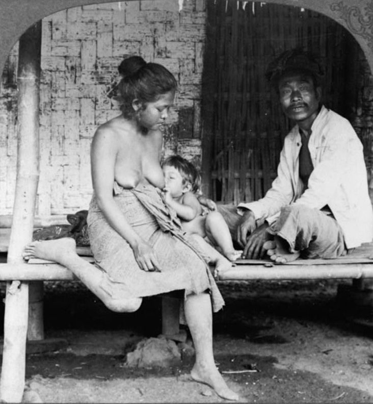 A Sundanese family at Tasikmalaya, Java